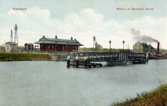 Draaibrug bij Station Maarssen rond 1912. De brug is vervangen in 1938 door de Maarsserbrug.